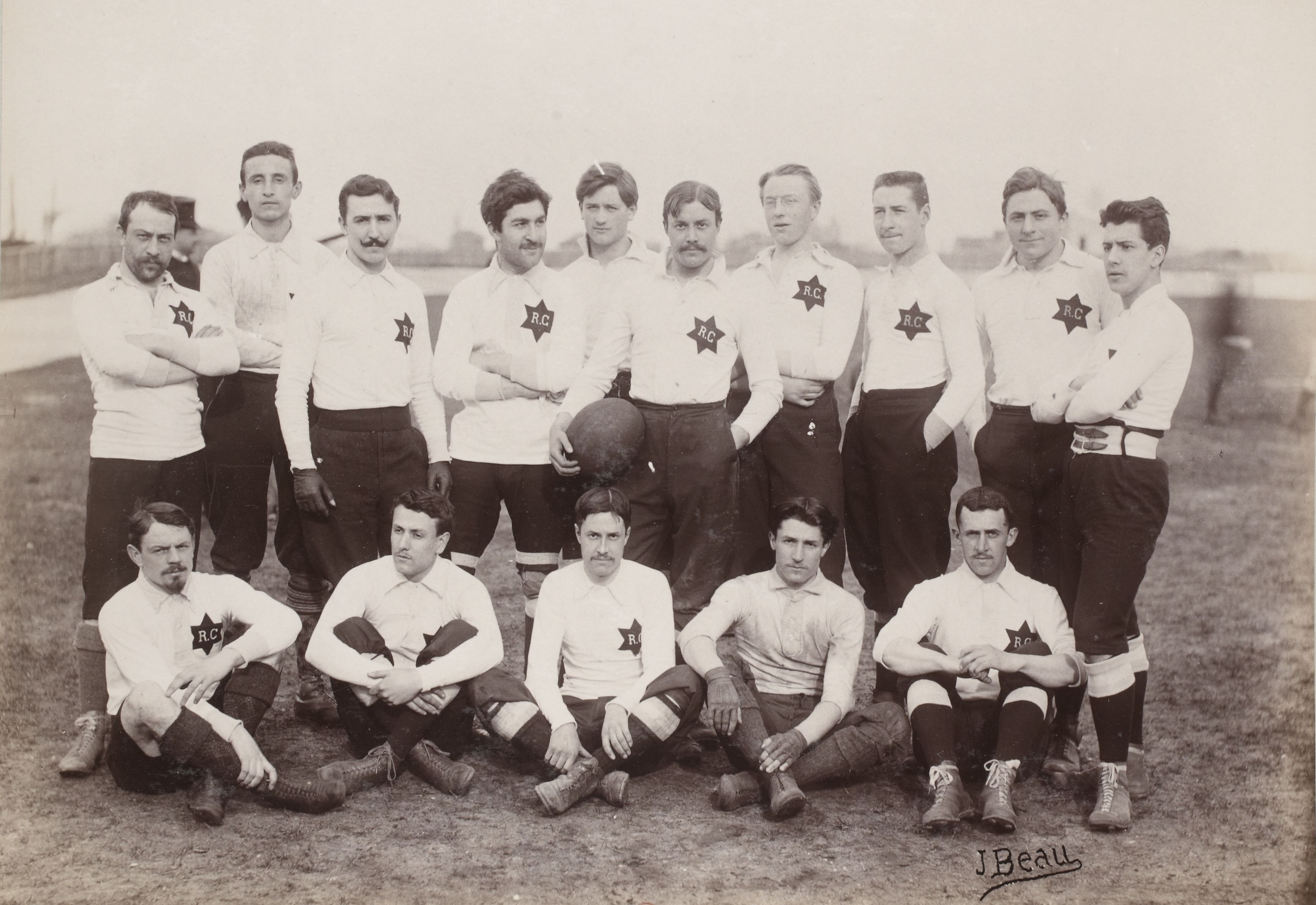 [Collection Jules Beau. Photographie sportive] : T. 5. Années 1897 et 1898 / Jules Beau : F. 12. Rugby, Racing Club